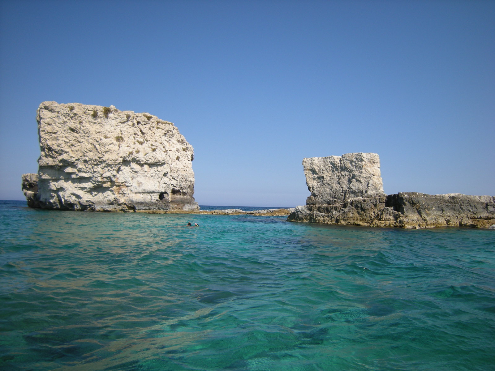 Two Rocks: I due frati, Siracusa, Italy